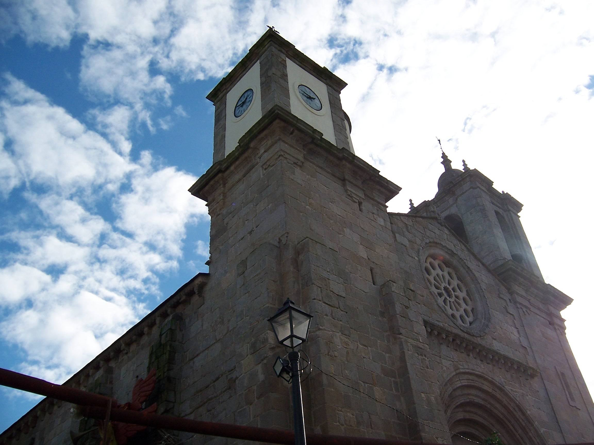 Iglesia Santa María Viveiro